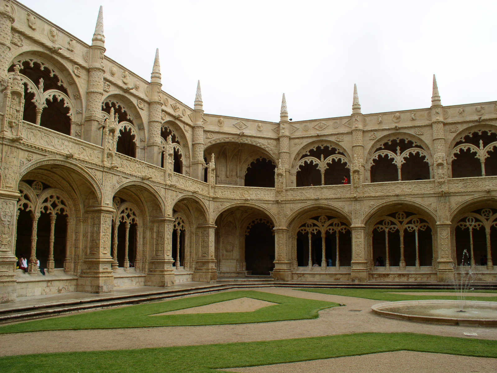 Mosteiro dos Jerónimos (Cloister) - Portugal Author: Raph Date: 9 August 2005